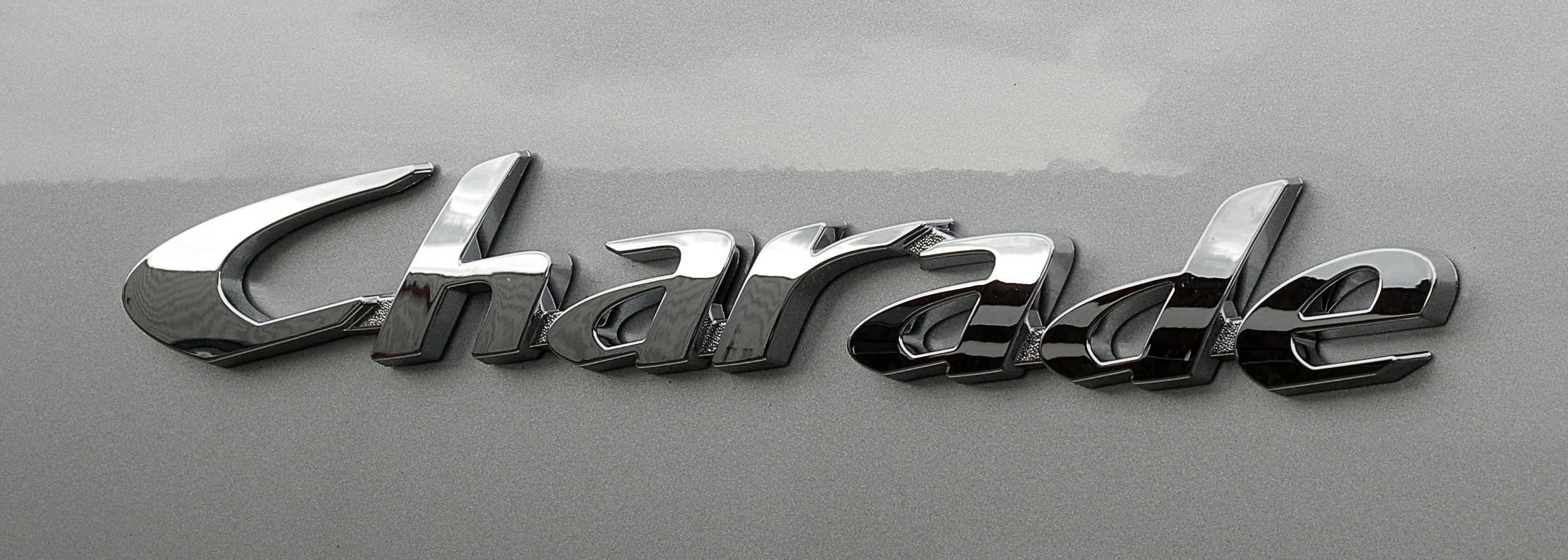 Daihatsu Charade 1.33 Basis (V)